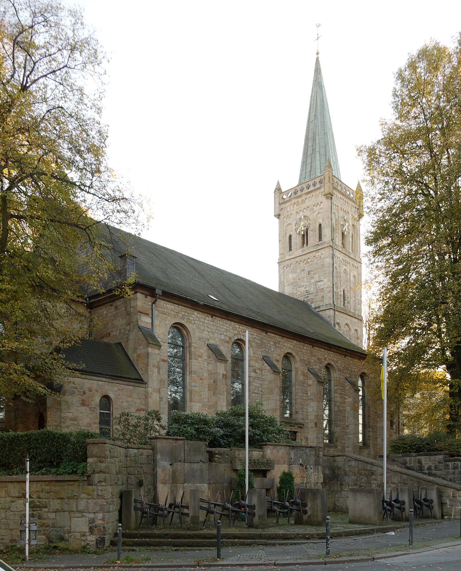 Die ev. Bartholomaeuskirche in Lütgendortmund, Dortmund, Germany.